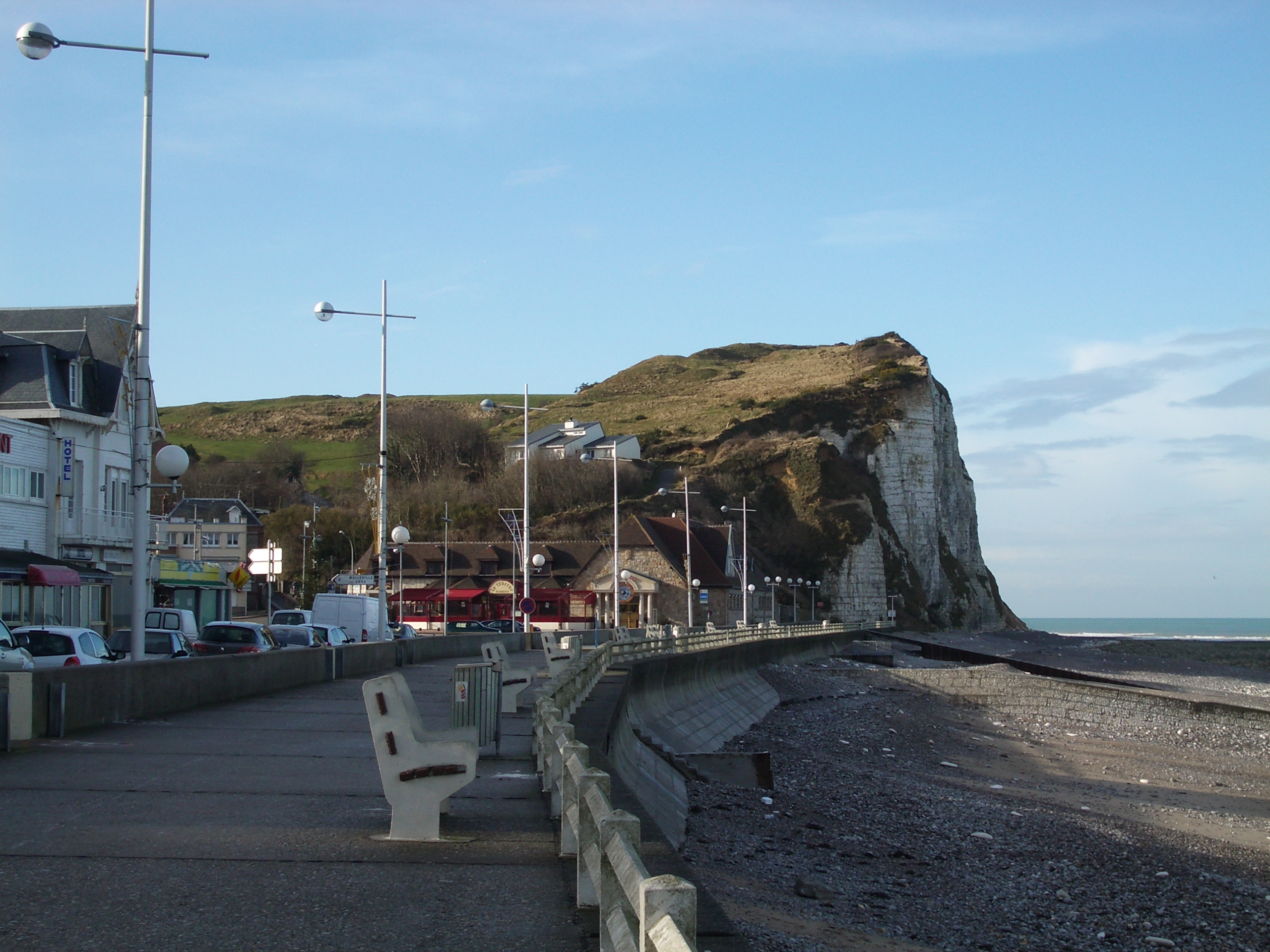 La falaise des Cateliers, à Veulettes-sur-Mer, marque de fin, à l'est, de la promenade de la digue Jean-Corruble.